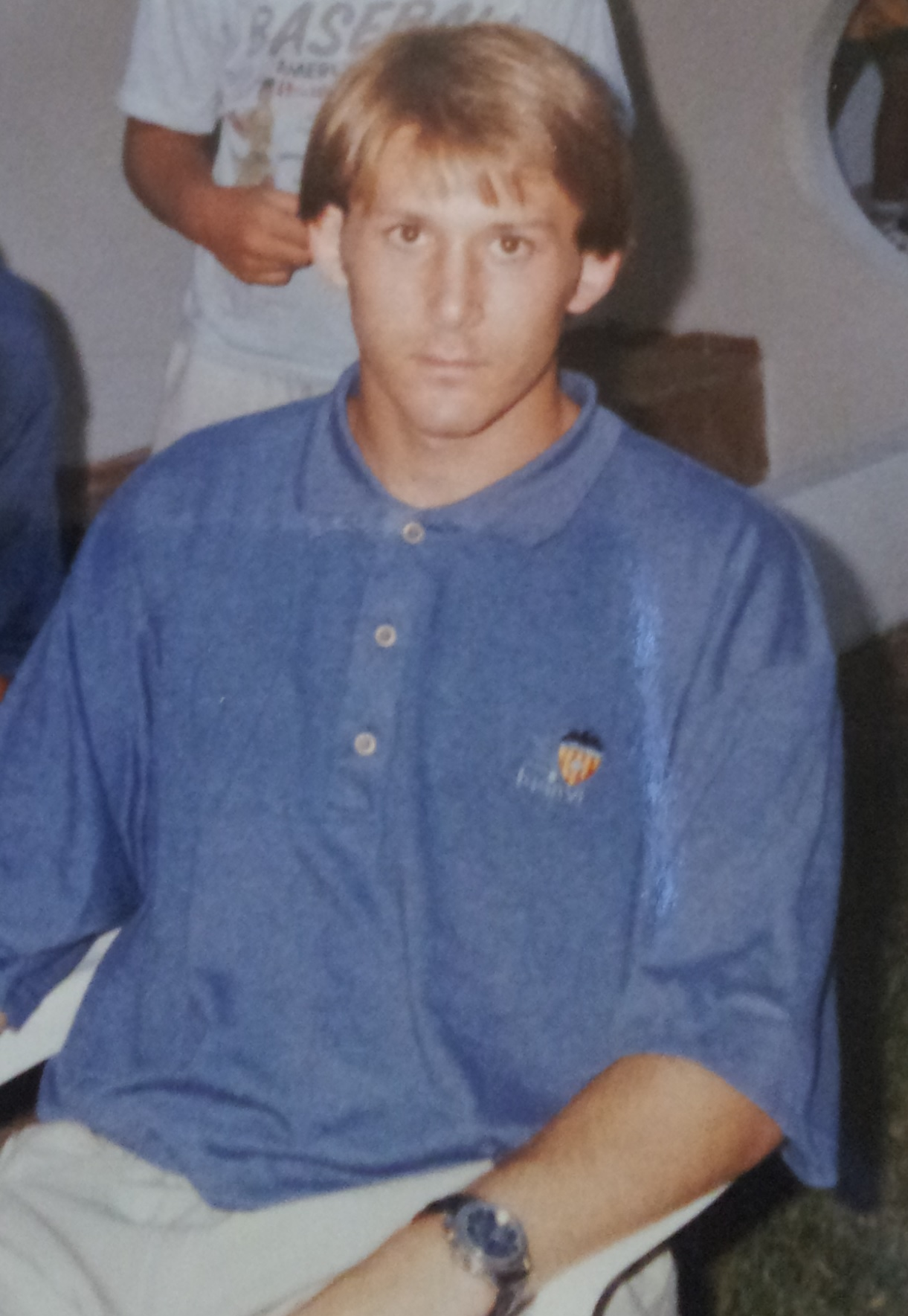 Gaizka Mendieta com a jugador del València CF